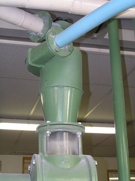 kleiner Fliehkraftabscheider in einer Mühle Photographer: Benutzer:BMK 2006-03-20 Please send reference and voucher copy to BMK(at)clever.ms Bitte Quellenangabe und Beleg an BMK(at)clever.ms